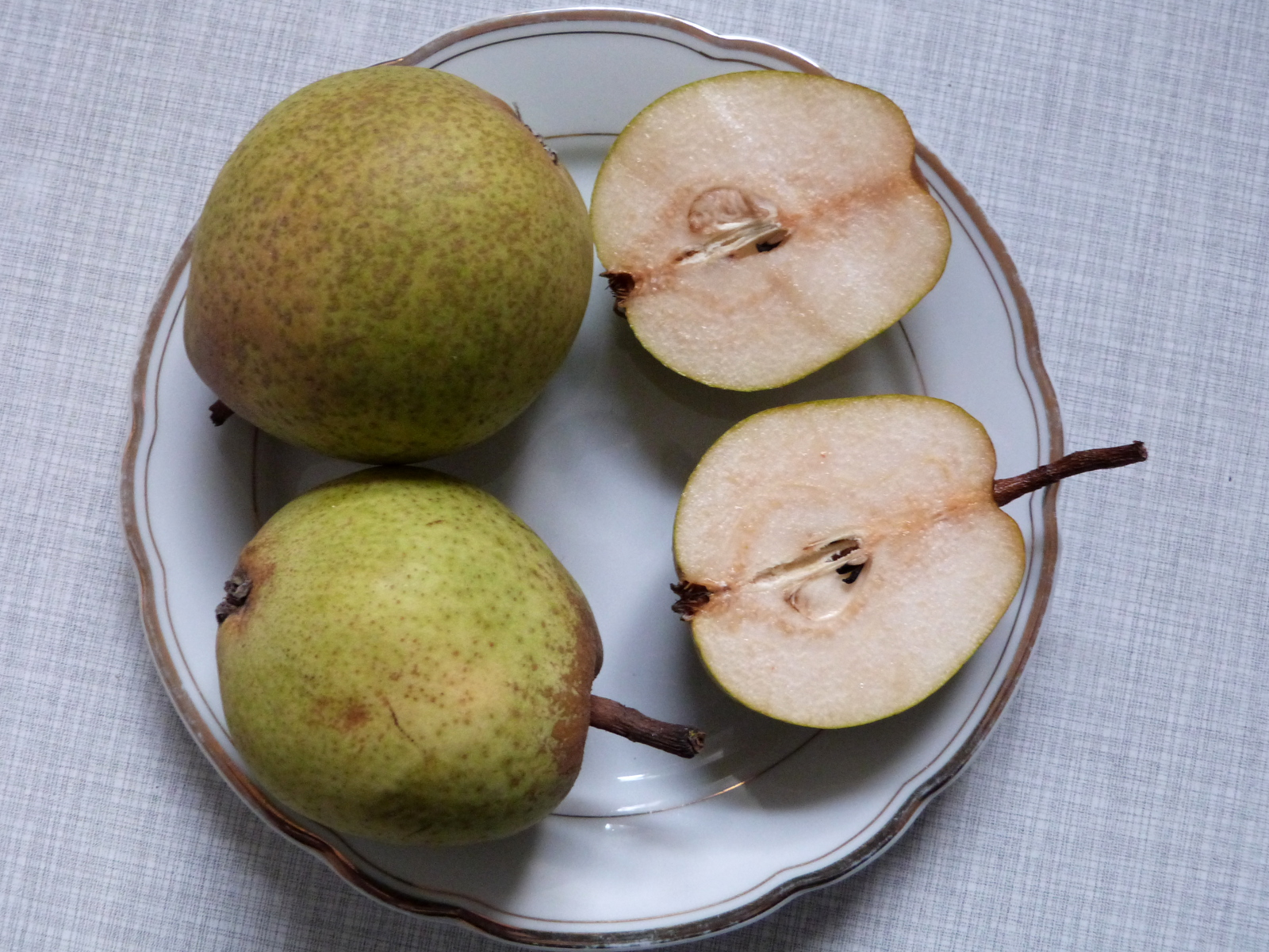 Birnen der Sorte Mollebusch. Gekauft auf dem Markt in Erlangen, Franken, Dezember 2015.